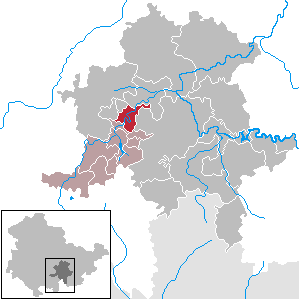 Schwarzburg in Thuringia - District Saalfeld-Rudolstadt